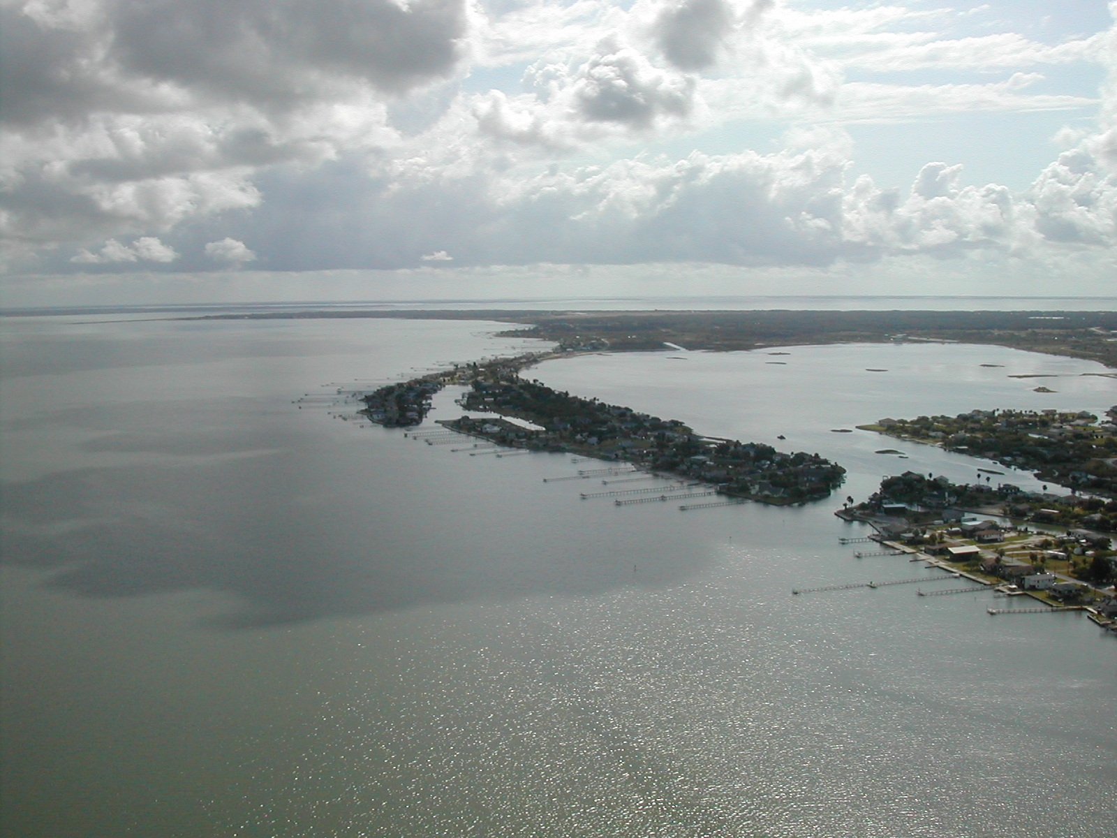 Salt Lake on Copano Bay